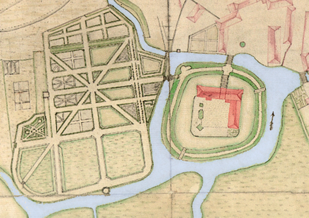 Lagekarte von Schloss Burgdorf an der Burgdorfer Aue mit Schlossgarten, Schlossgebäude und Gewässer nachträglich koloriert